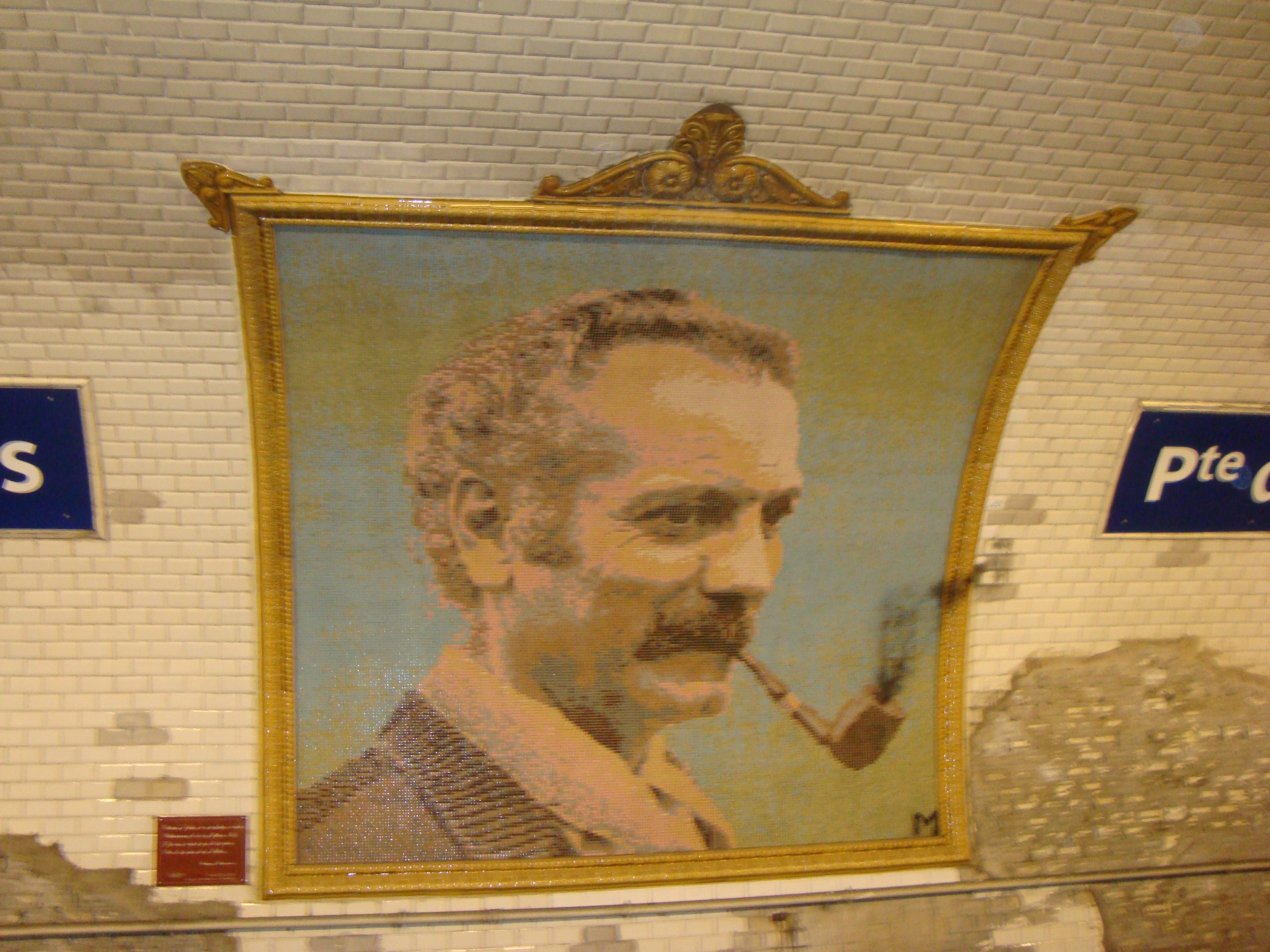 Quai de la station Porte des Lilas sur la ligne 11 avec mosaïque de Georges Brassens.